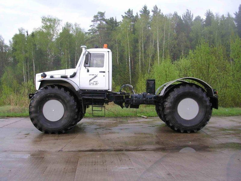 Мамонтёнок — плавающий грузовой вездеход с шарнирно-сочлененной рамой на шинах сверхнизкого давления.